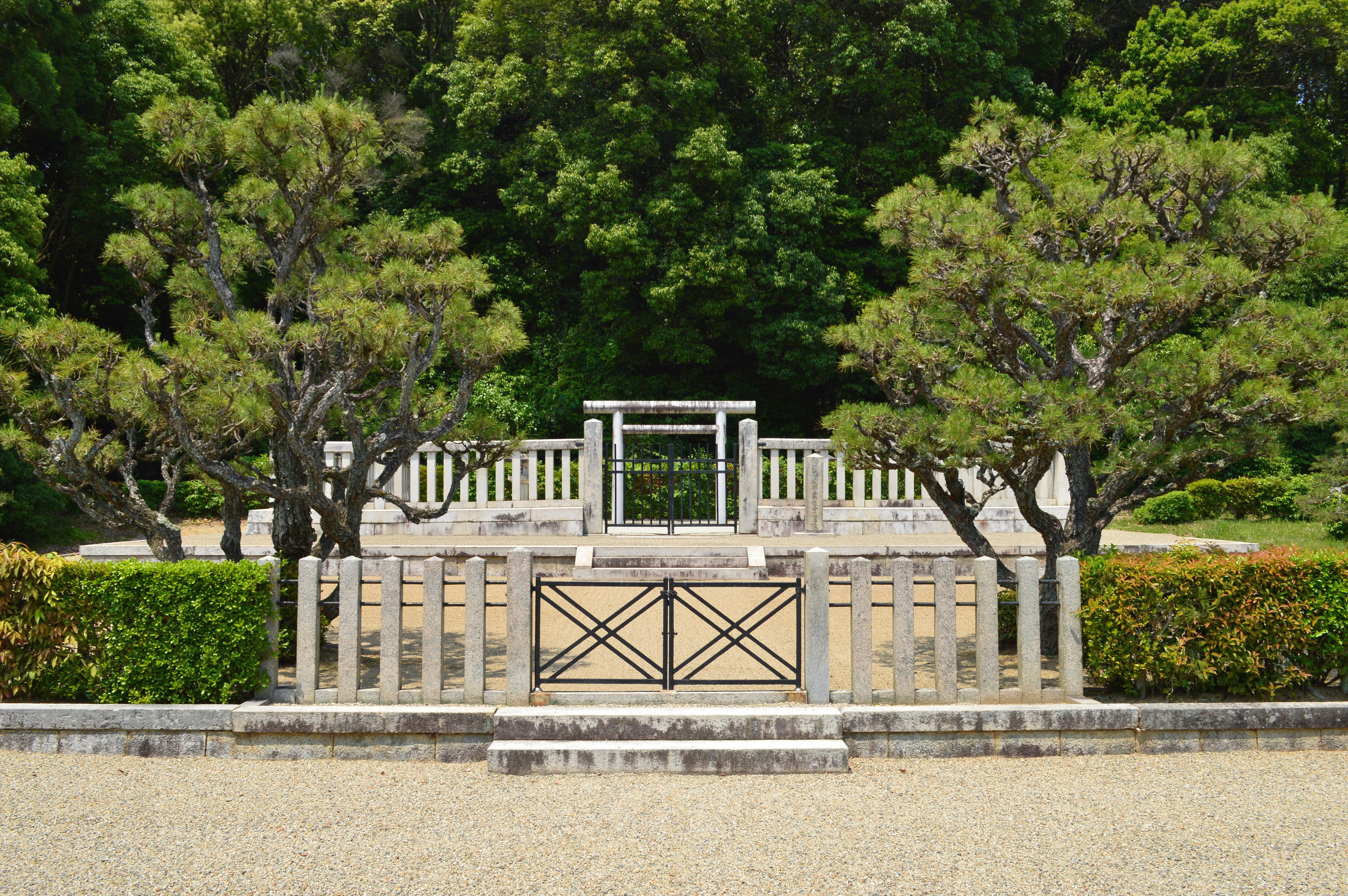 懿徳天皇畝傍山南纖沙溪上陵 拝所